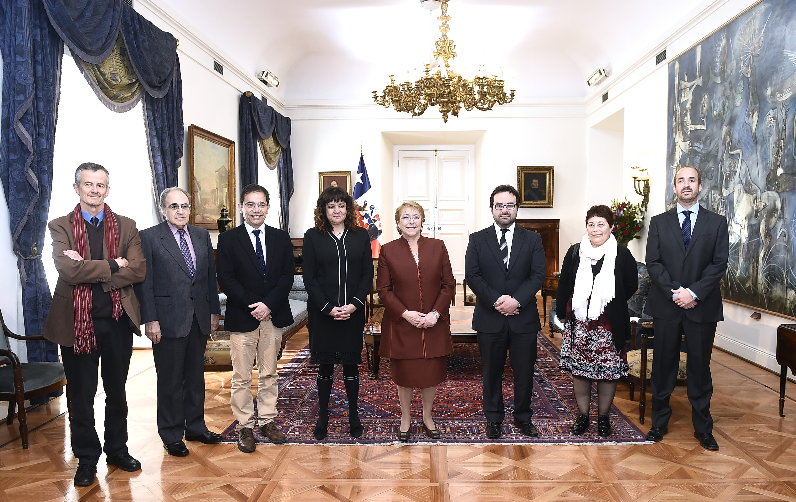 Gobierno de Chile